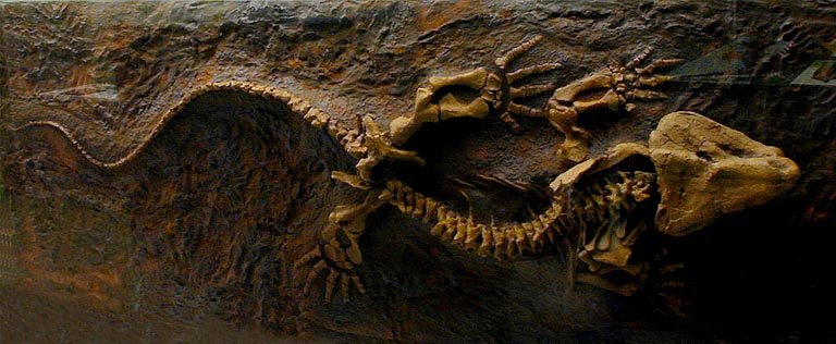 Fossile di Limnoscelis palustris, conservato al Museo civico di storia naturale di Milano